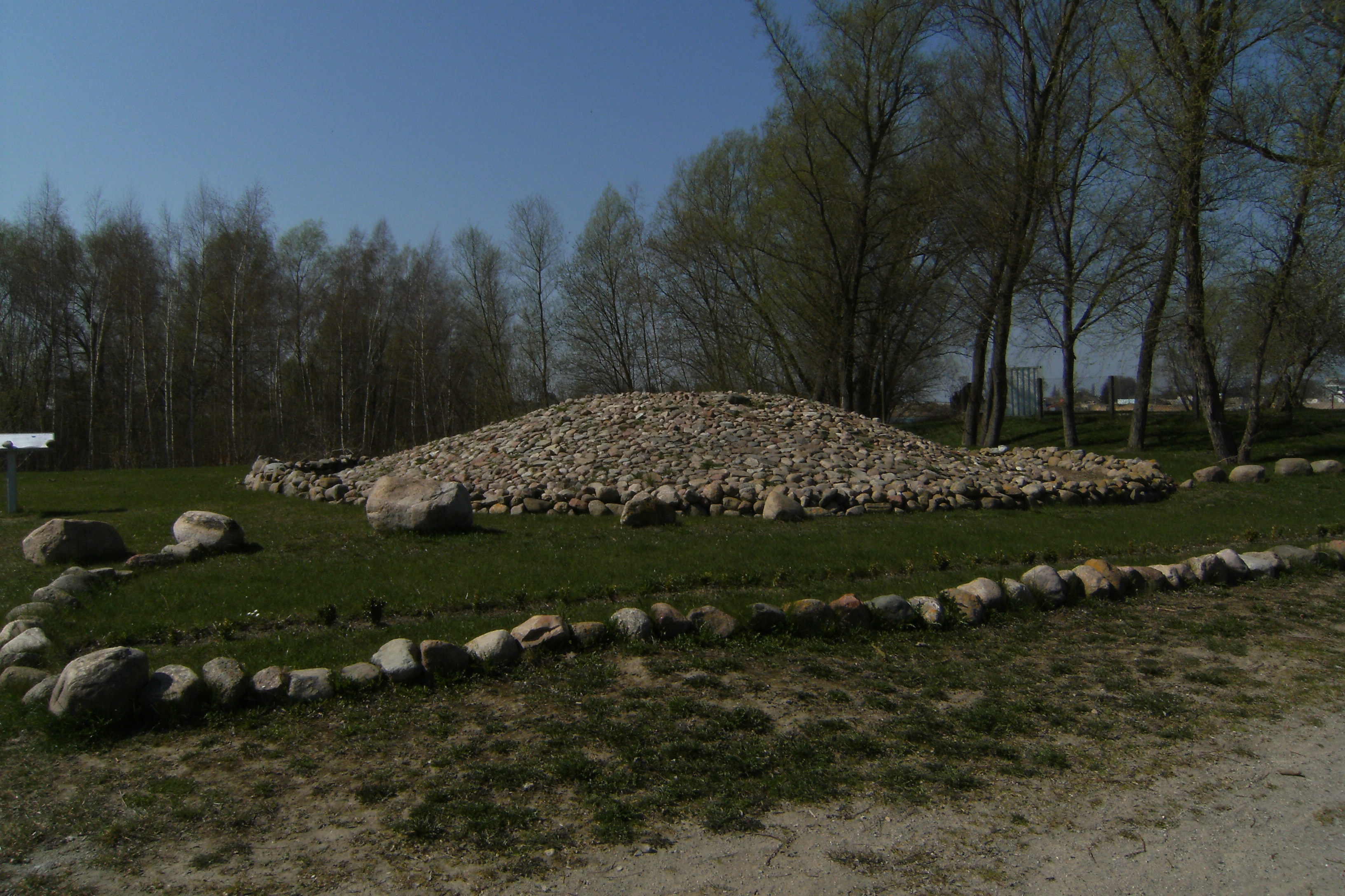 Rekonstruktion der Rollsteinbedeckung des Grabhügels Zarrenthin